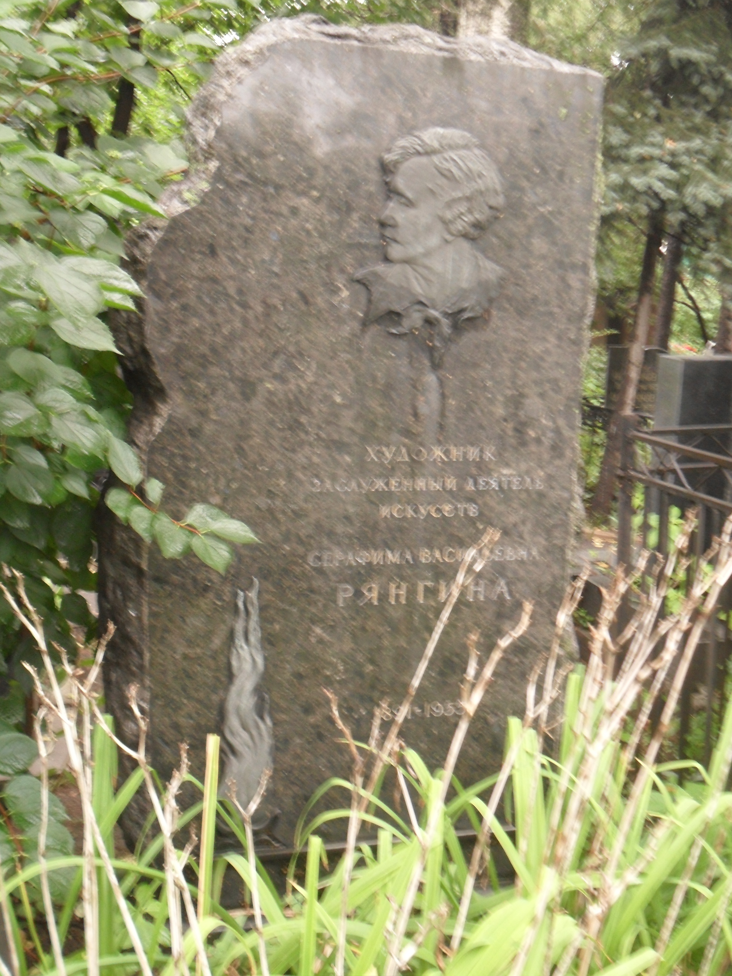 Могила художника Серафимы Рянгиной на Новодевичьем кладбищще.